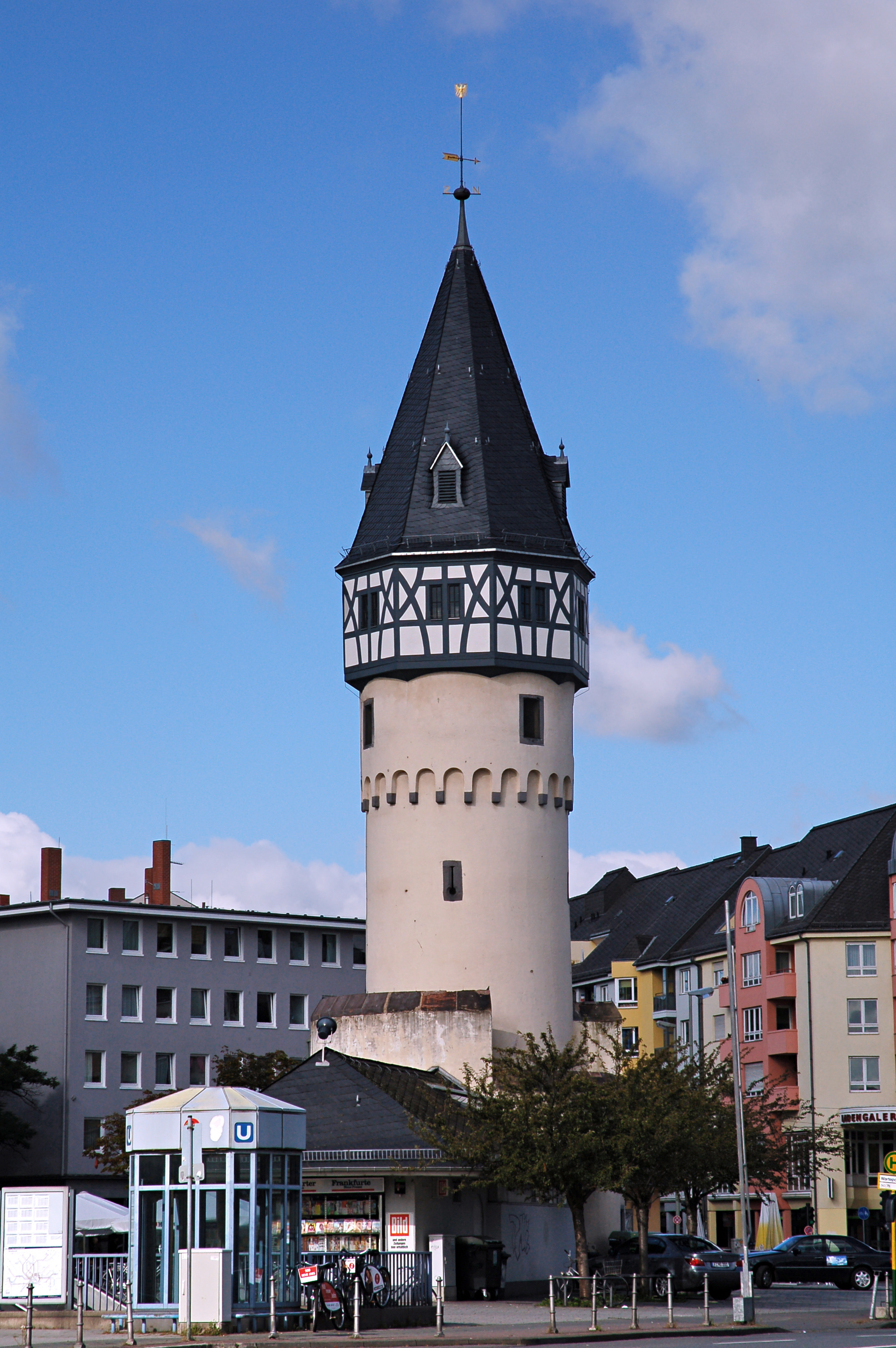 Bockenheimer Warte